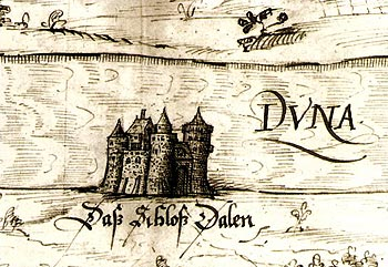 Kujutis Poola maakaardi katkendist XVII sajandi algusest. Vana XVII sajandi maakaardi koopia kujutis.